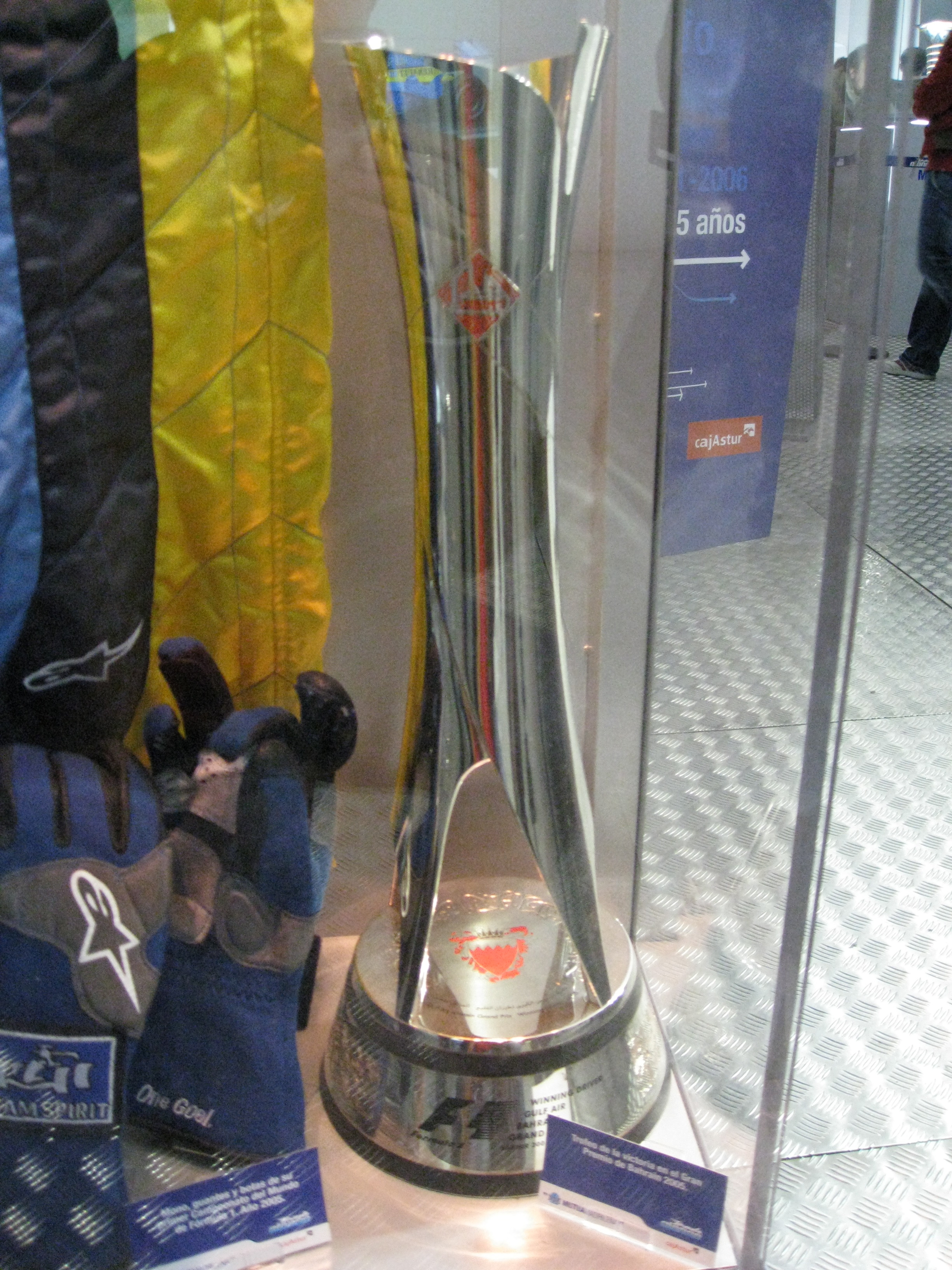 Copa de campeón en Barhein